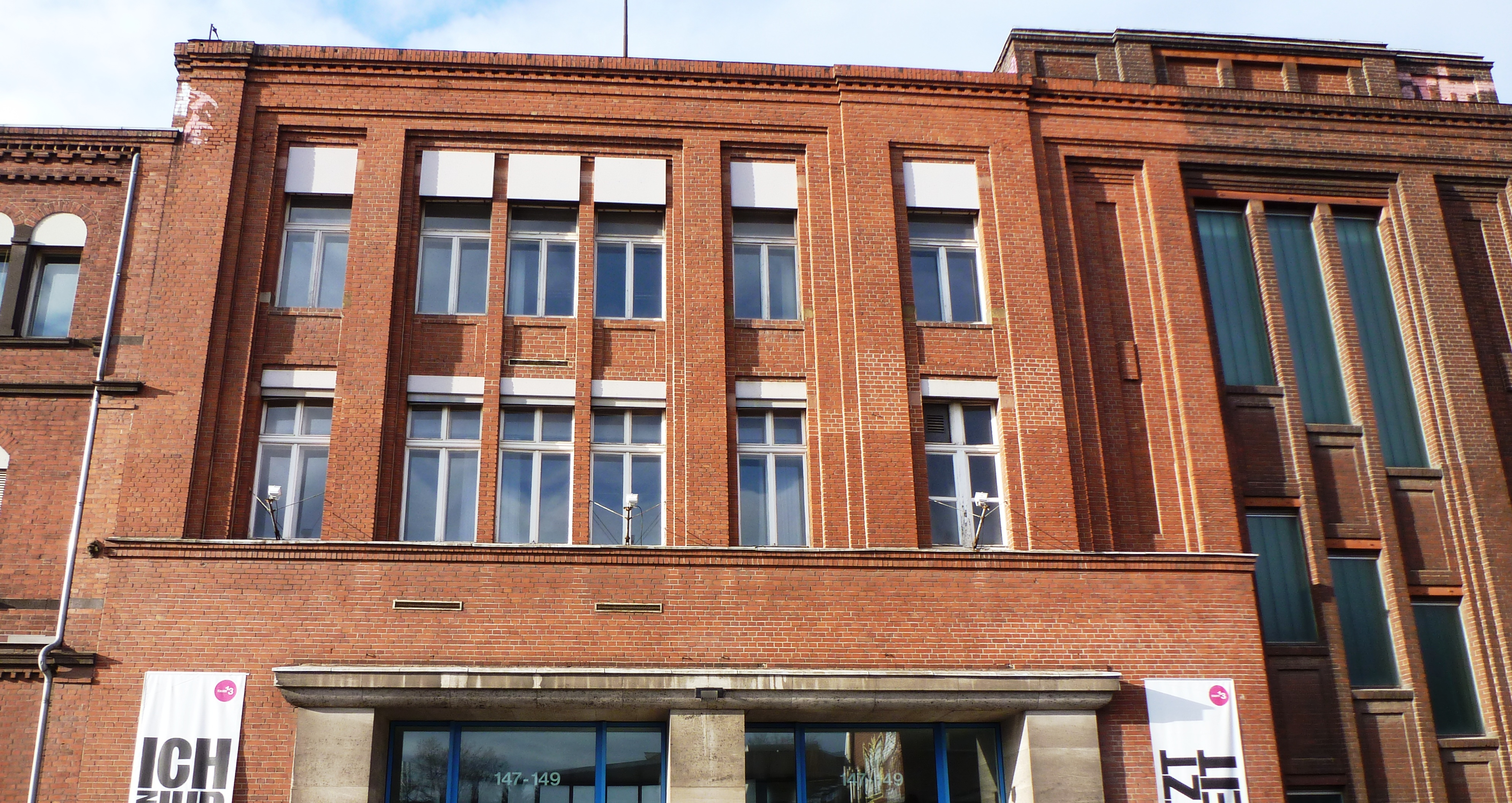 Haus Deutz-Mülheimer-Str. 147 in Köln-Mülheim This is a photograph of an architectural monument.